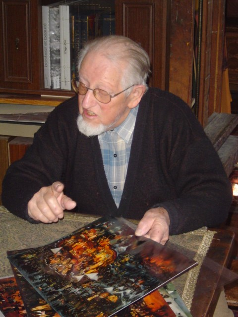 Grand pourfendeur des dictateurs politiques du 20è siècle